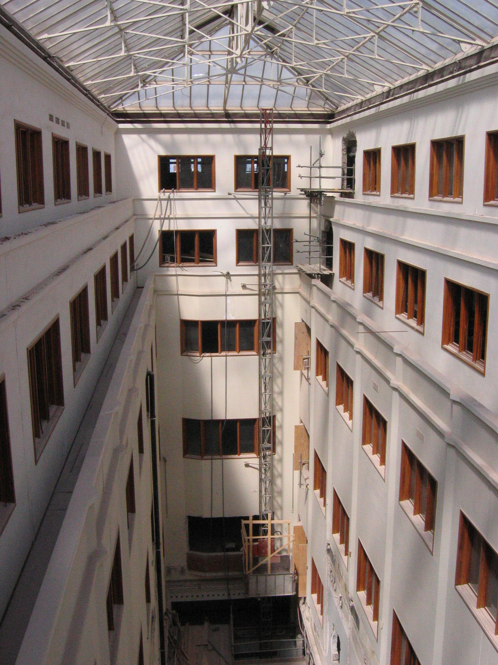 Amsterdam: Stadsarchief Amsterdam (2007) verbouwing 2004-2007 architect: Claus en Kaan voormalig hoofdkantoor Nederlandse Handel-Maatschappij (1919-1926) architect: K.P.C. de Bazel betonskelet: A.D.N. van Gendt Rijksmonument 1991 verbouwing 1974-1979 J.F. Berghoef Genootschap AetA excursie 29 mei 2005 Vijzelstraat 32 Amsterdam